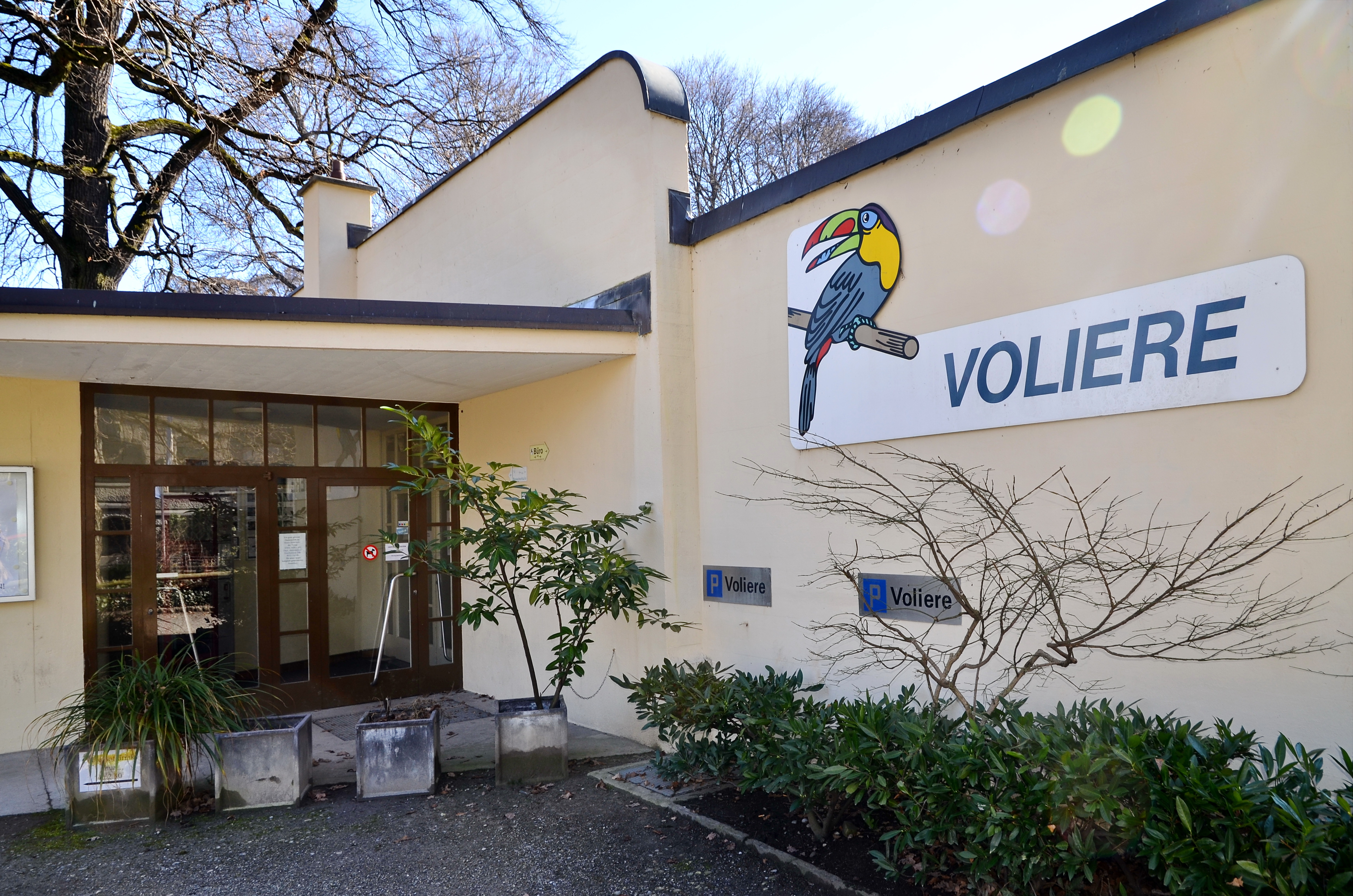 Voliere, Arboretum in Zürich-Enge (Switzerland)